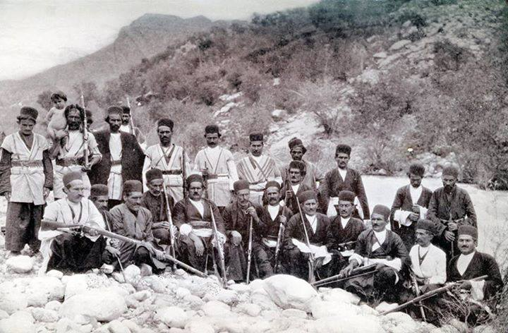 کلانتران و بزرگان طایفه بابااحمدی از ایل بختیاری که در سال 1306 هجری شمسی درحال کوچ از کوهرنگ بختیاری به استان خوزستان